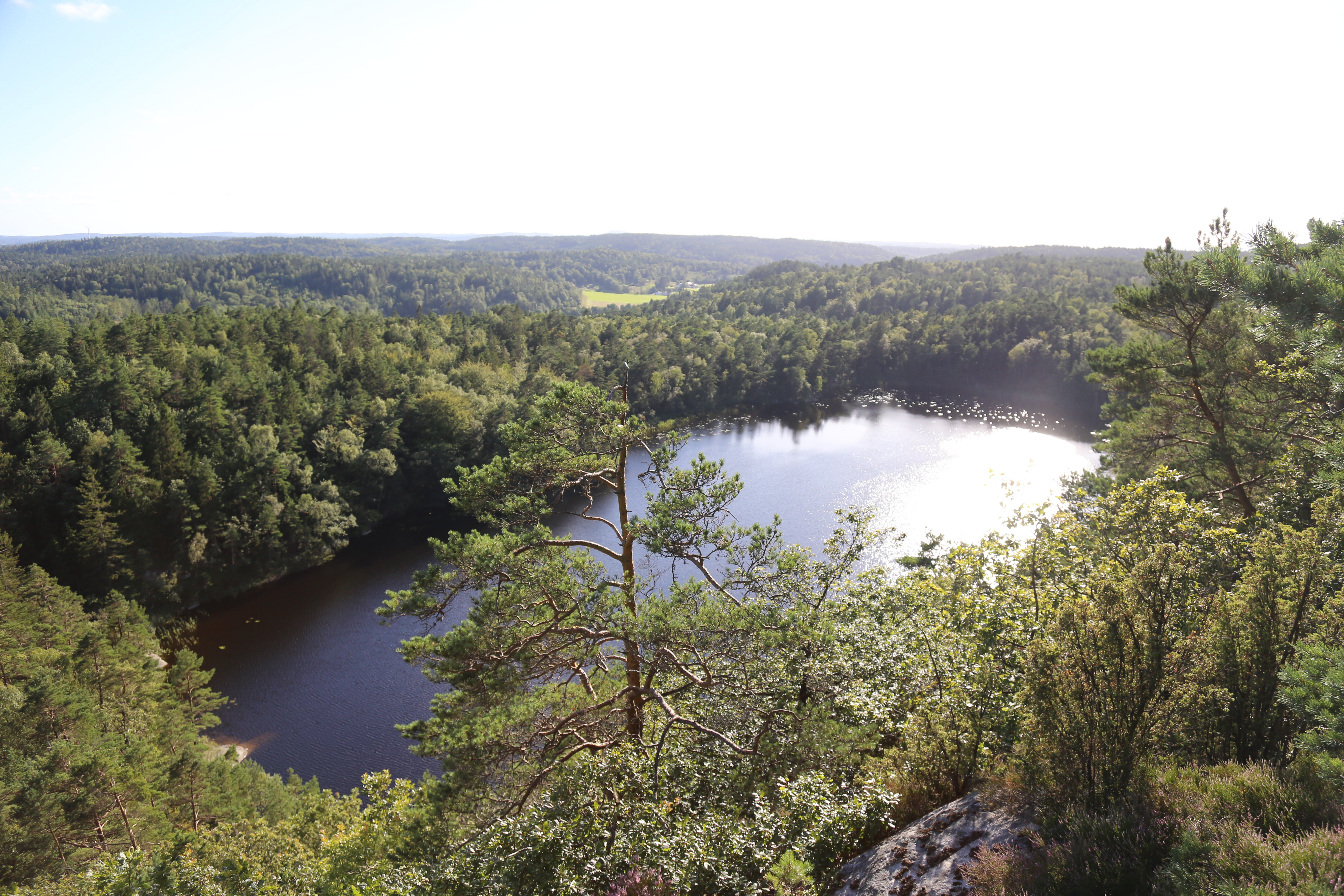 Sjön Flesevatten i Stenungsunds kommun sedd från Tunneberget nordost om sjön.